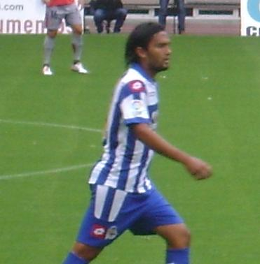 Abel Aguilar, futbolista colombiano.